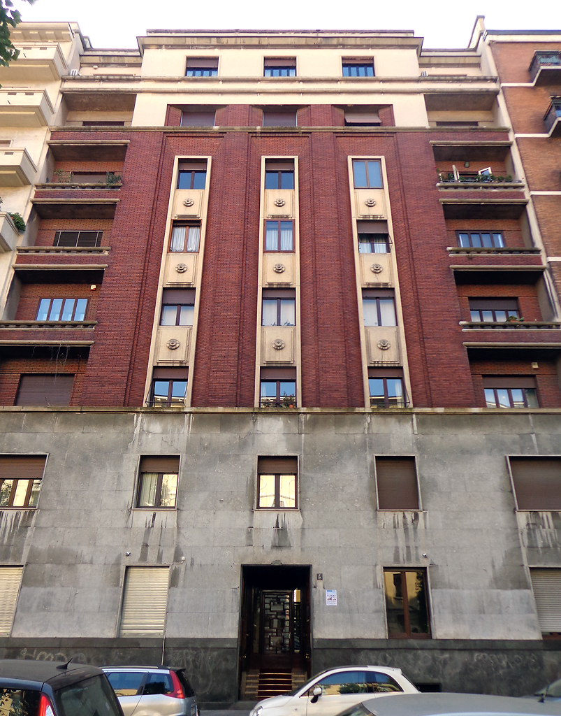 Milano, edificio residenziale in via Giuditta Sidoli n. 4, costruito nel 1935 su progetto di Giuseppe Martinenghi.Fonte: Maurizio Boriani, Corinna Morandi, Augusto Rossari, Milano contemporanea. Itinerari di architettura e di urbanistica, Maggioli Editore, 2007, p. 225. ISBN 978-88387-4147-6 Invalid ISBN.